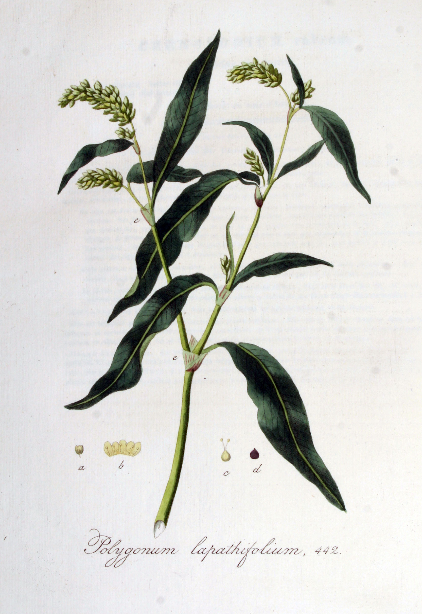 Persicaria lapathifolia (L.) Delarbre (Syn. Polygonum lapathifolium L.)